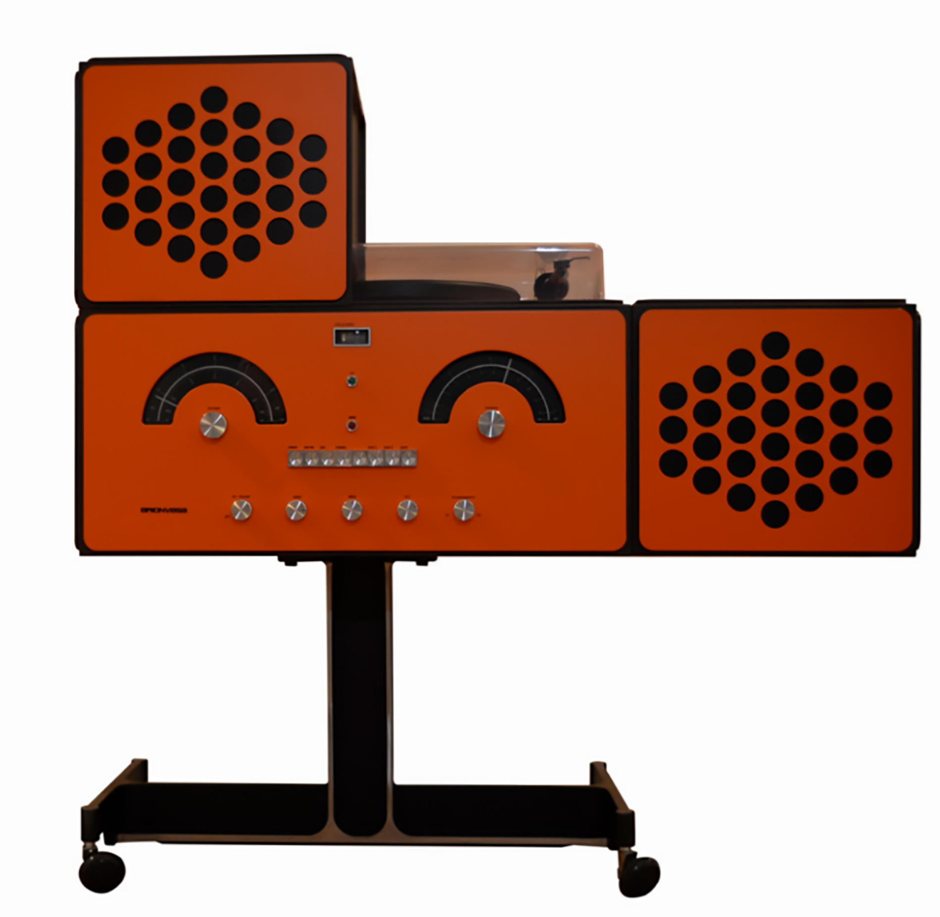 Vèneto: Foto RR 126 scattata durante la mostra dei Castiglioni di Pordenone, 2019